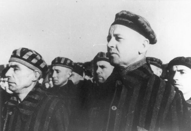 KZ Sachsenhausen, Häftlinge bei Zählappell Zentralbild 9.12.1960 Zur Einweihung der Mahn- und Gedenkstätte Sachsenhausen am 23. April 1961. - Vor den Toren Berlins, auf dem Gelände des ehemaligen faschistischen Konzentrationslagers Sachsenhausen bei Oranienburg, in das von 1936 bis Kriegsende 200.000 Menschen verschleppt wurden, entsteht - wie in Buchenwald und Ravensbrück - eine würdige Mahn- und Gedenkstätte. Jeder Quadratmeter Boden ist hier vom Blut der 100.000 Toten durchtränkt, die im KZ Sachsenhausen mit seinen 73 Aussenkommandos erschlagen, erhängt, erschossen, zu Tode geprügelt, durch erbarmunslose Sklavenarbeit zu Grunde gerichtet und vergast wurden. Doch gelang es den SS-Mördern nicht, den Widerstandswillen der politischen Häftlinge zu brechen. So wurde Sachsenhausen auch zur Stätte der großen internationalen Solidarität und des mutigen Kampfes gegen Faschismus und Krieg. UBz: Häftlinge während eines Zählappells English (rough partial translation): Central picture 9 December 1960 For the .. Sachsenhausen memorial on 23 April 1961. Before the gates of Berlin, was an example of the fascist concentration camps, Sachsenhausen at Oranienburg, where from 1936 to the end of the war 200,000 people were locked up, still standing, just like Buchenwald and Ravensbrück - an appropriate reminder and memorial place. Each square meter ground here is soaked with the blood of the 100,000 dead, who in KZ Sachsenhausen and its 73 satellite camps were beaten, hanged, shot and worked to death, ground down by pitiless slave labor and gassed. But the SS murderers were outlasted by the unbroken will of the political prisoners to form resistance. So became Sachsenhausen also the place of international solidarity and the courageous struggle against fascism and war. Shown: Prisoners during a roll call and number count.